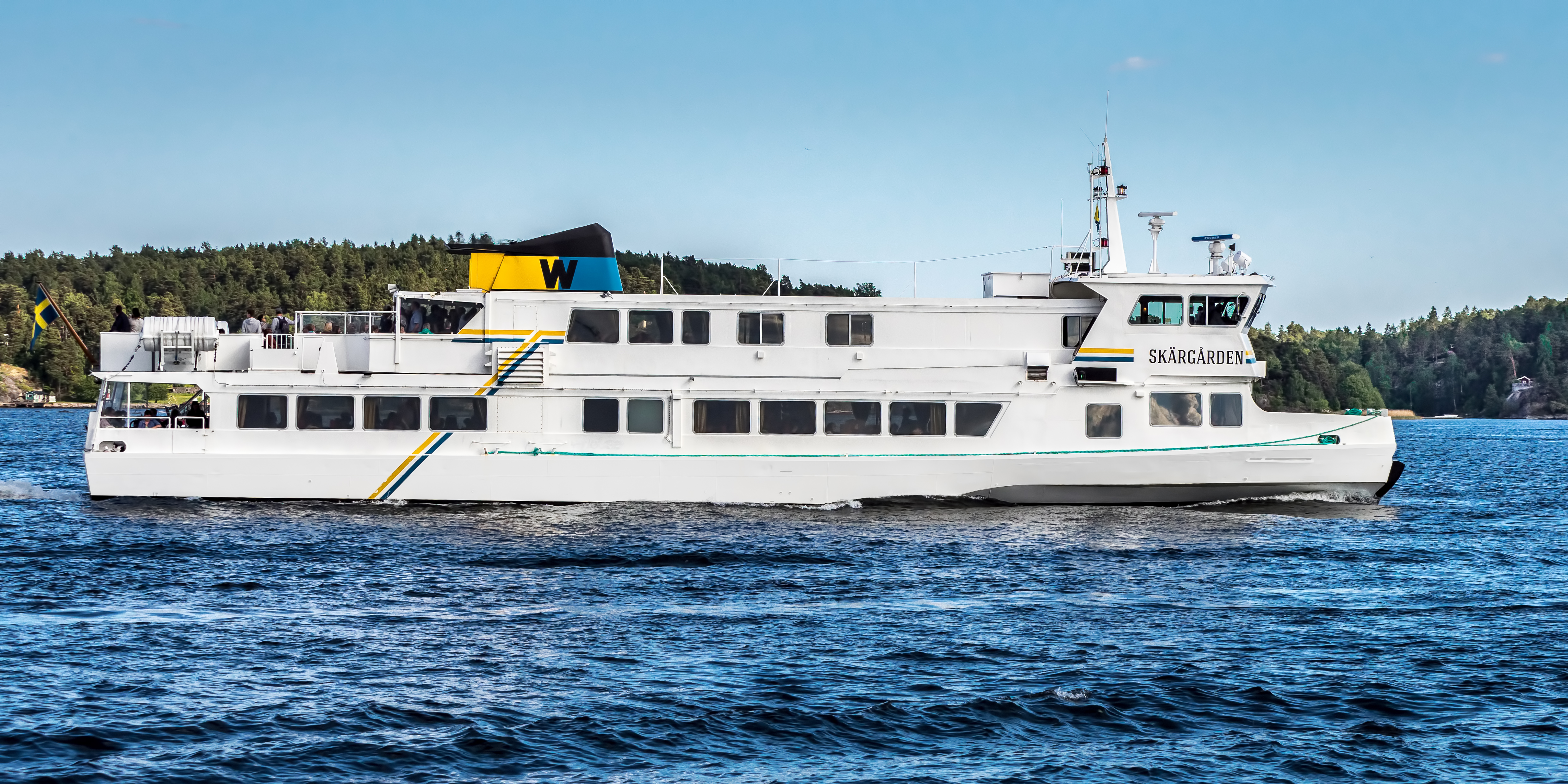 M/S Skärgården